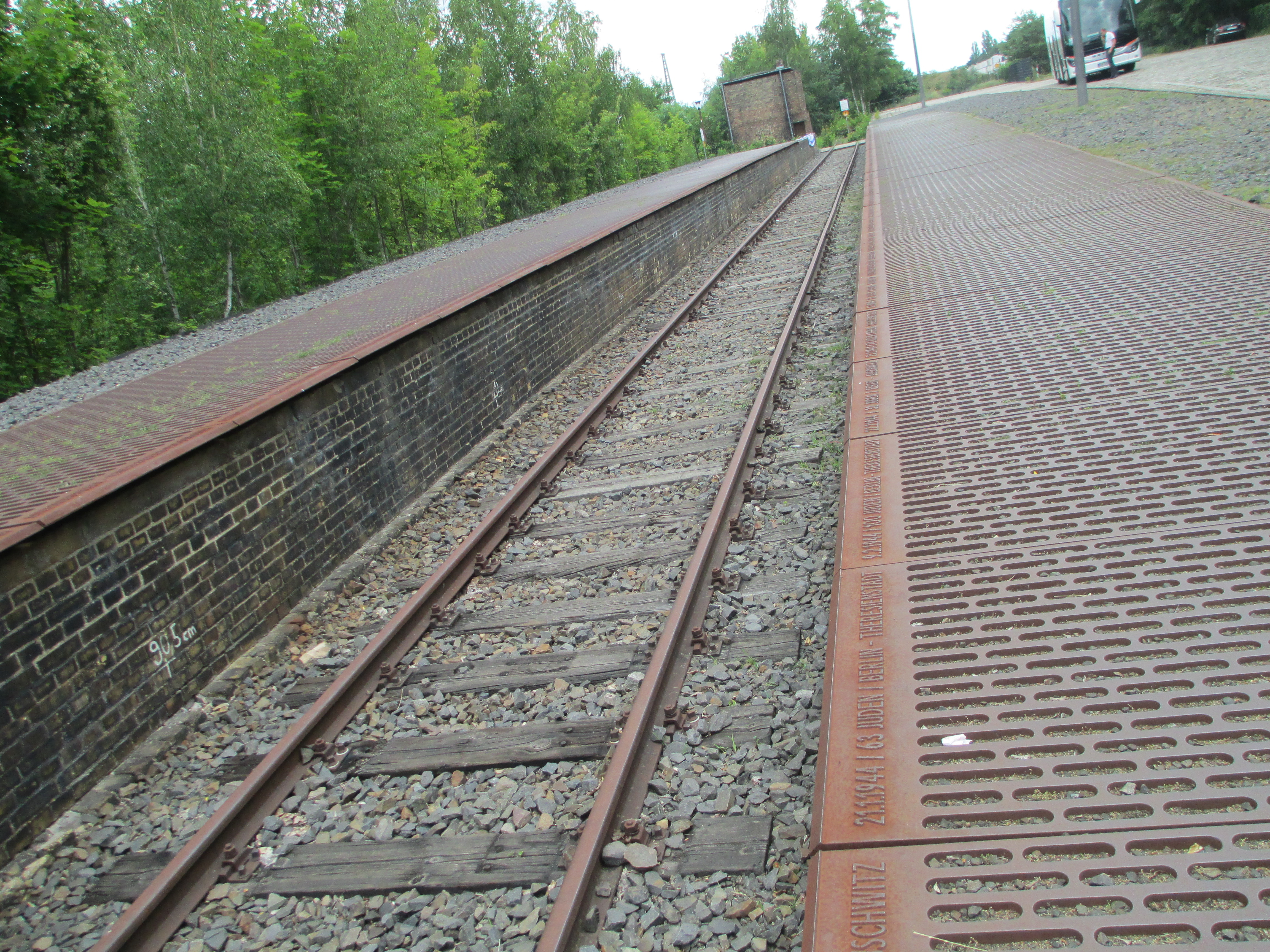 רציף 17 בתחנת גרונוולד בברלין ממנו שולחו יהודי העיר להשמדה